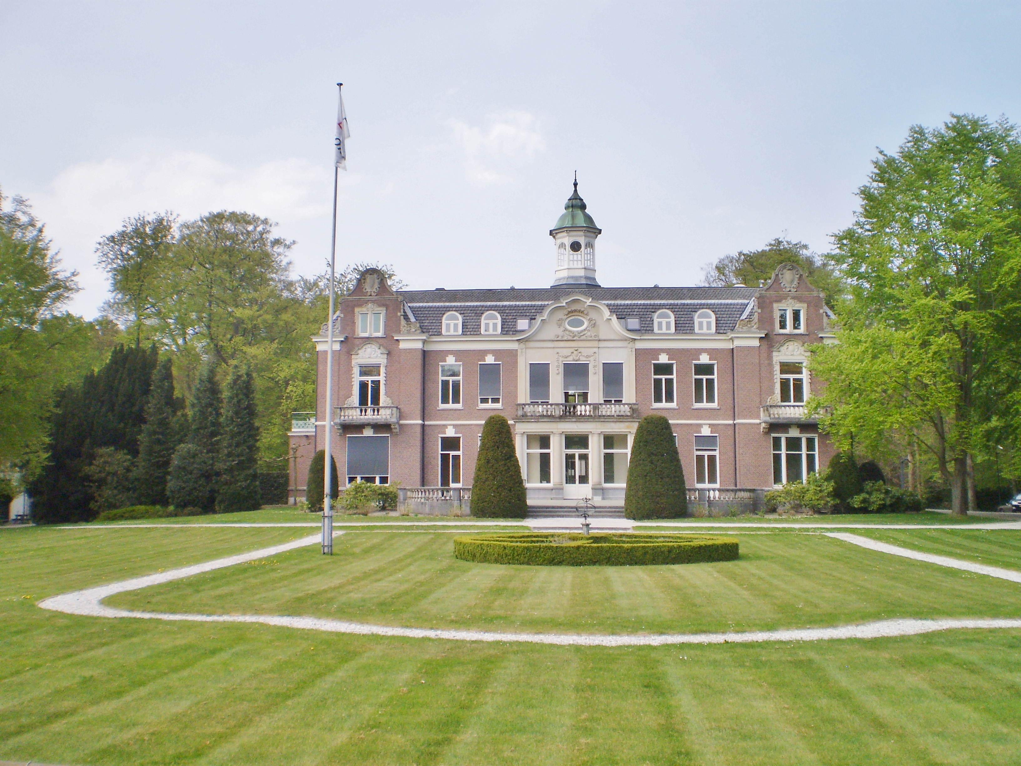 Vanaf de Eemnesserweg